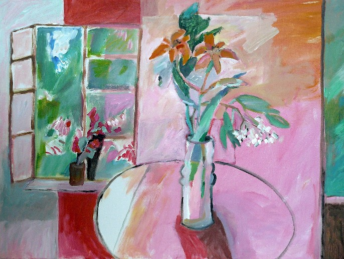 Acryl auf Leinwand, 60 x 70 cm